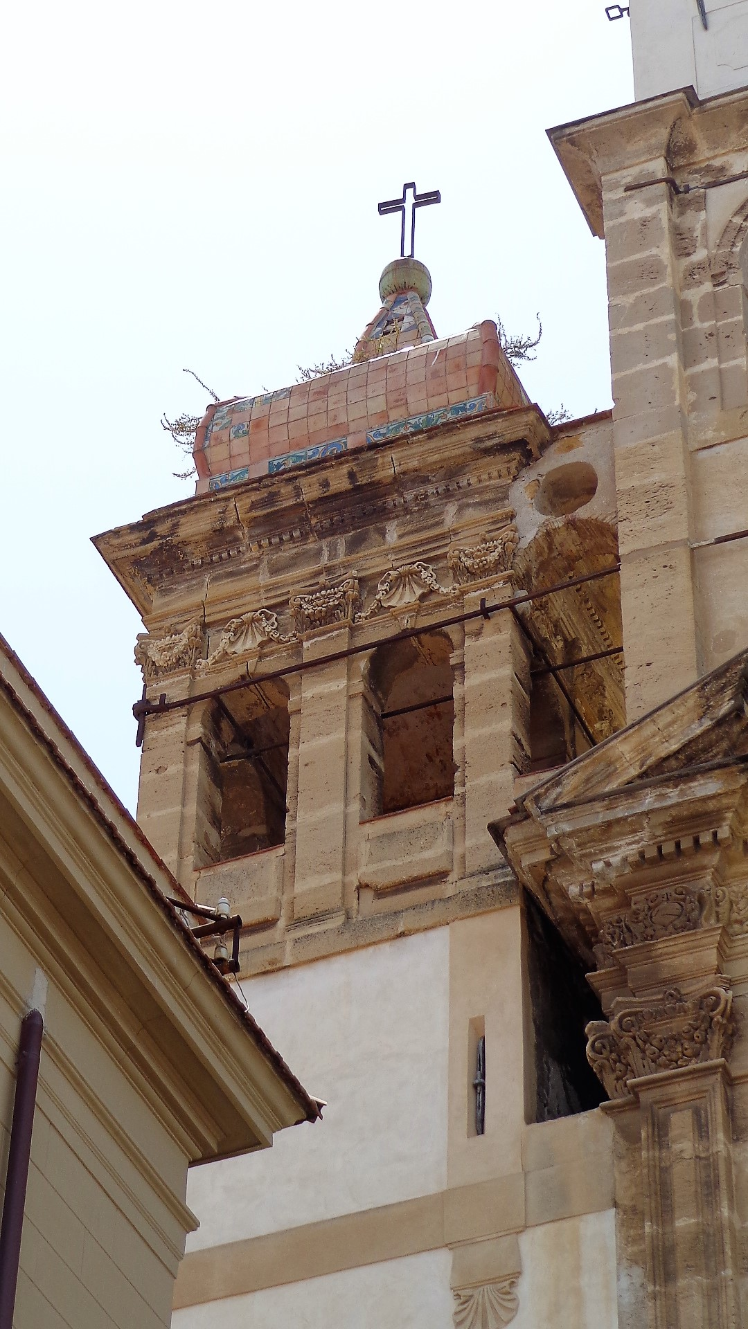 Campanile con piastrelle maiolicate.